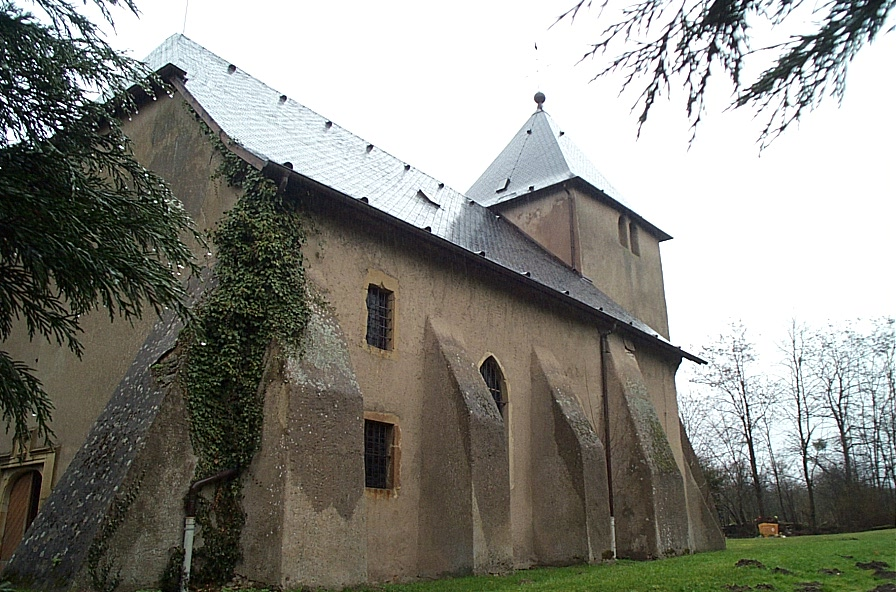 Eglise de Valmunster (Moselle, France)